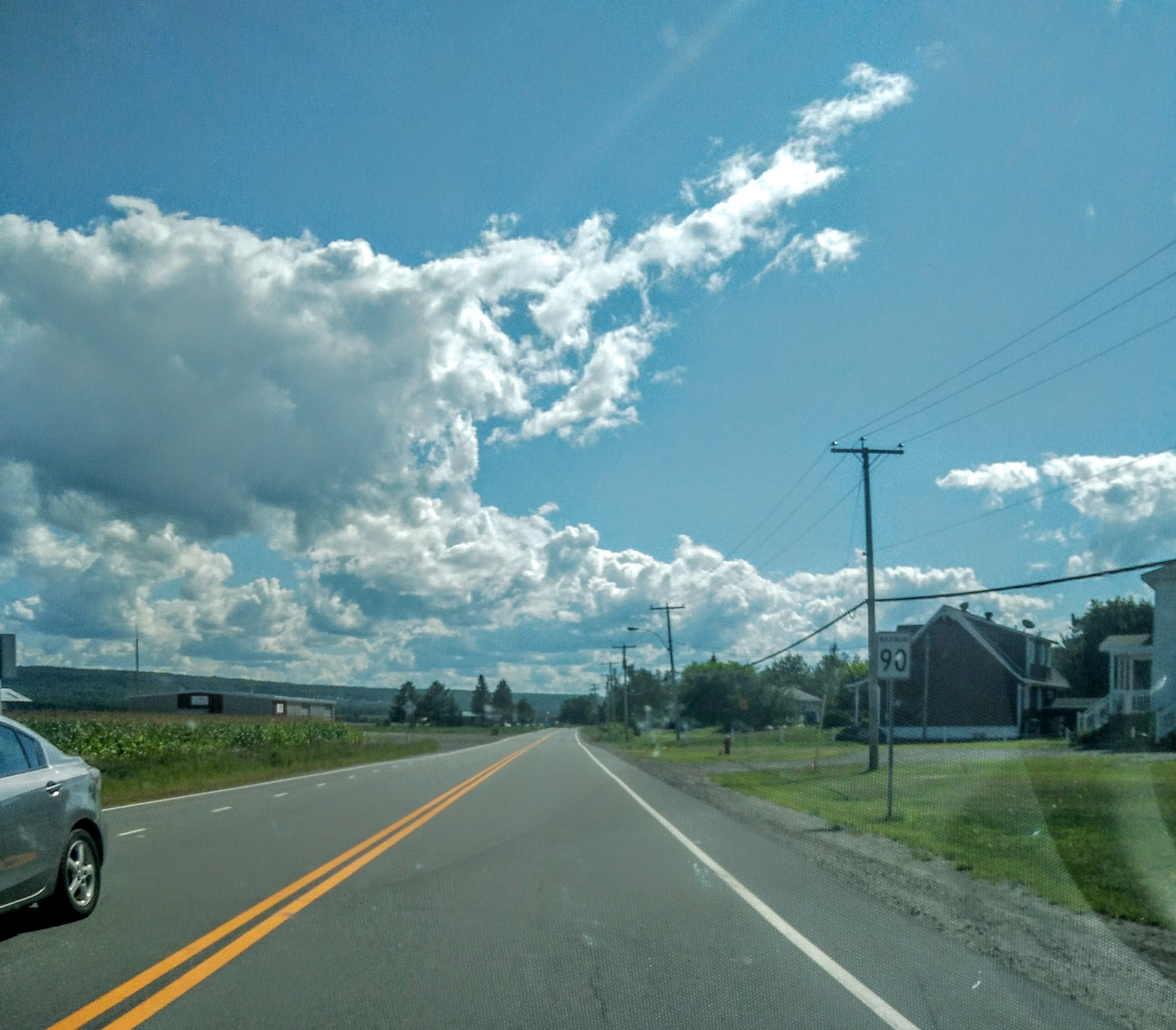 Route 283 entre Montmagny et Notre-Dame-du-Rosaire